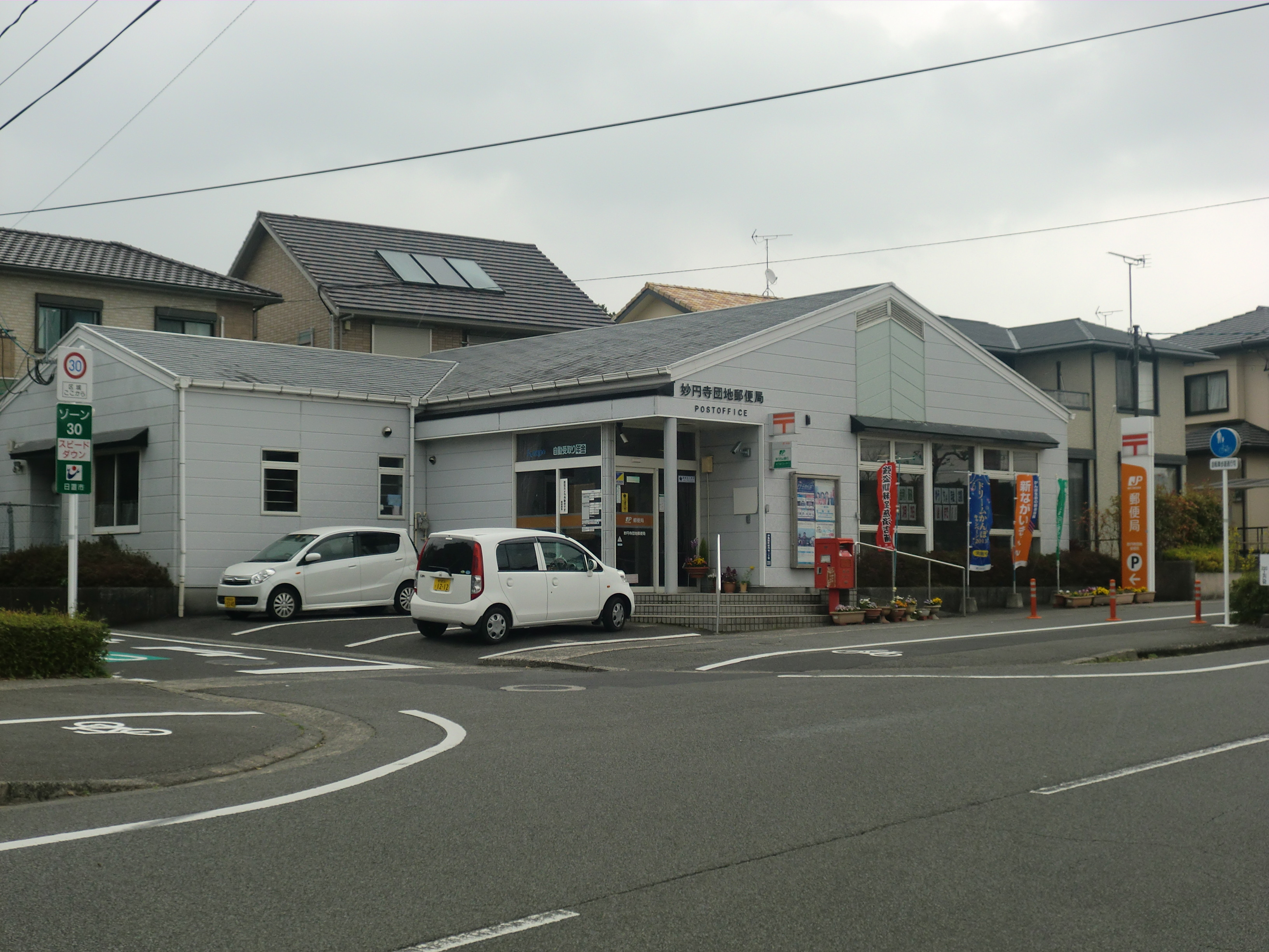 日置市にある妙円寺団地（みょうえんじだんち）郵便局